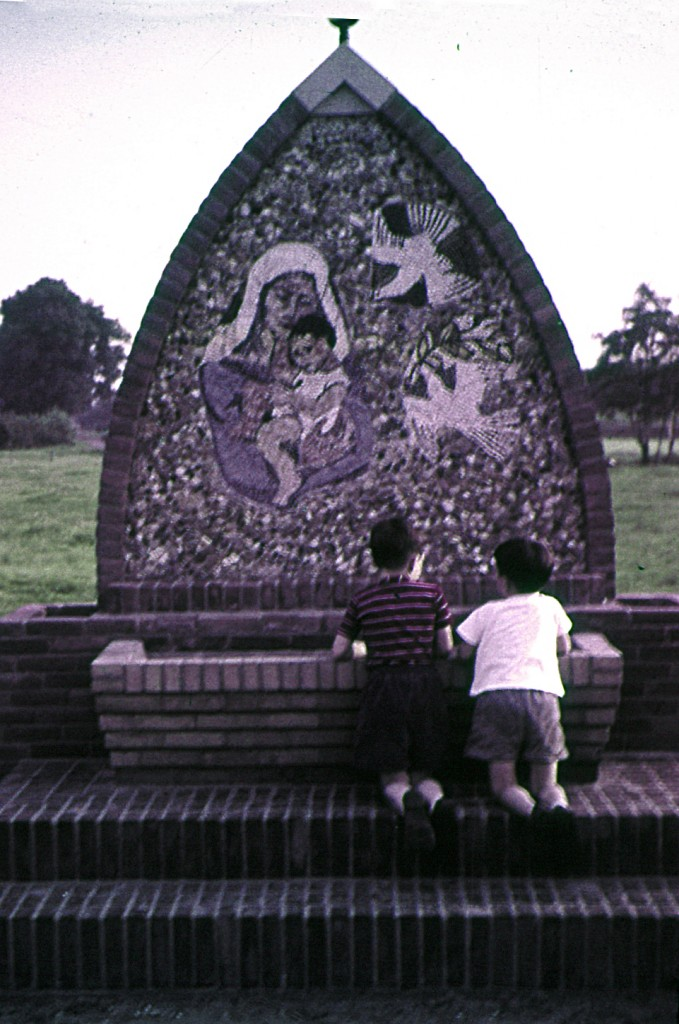 De originele kapel aan de Veldmaterstraat in Haaksbergen is in 1970. De exacte datum van deze foto is niet bekend, maar het is de enige bekende kleurenfoto. In 2009 is de kapel herbouwd door vrijwilligers van de vlakbij gelegen HH. Bonifatius en Gezellenkerk.